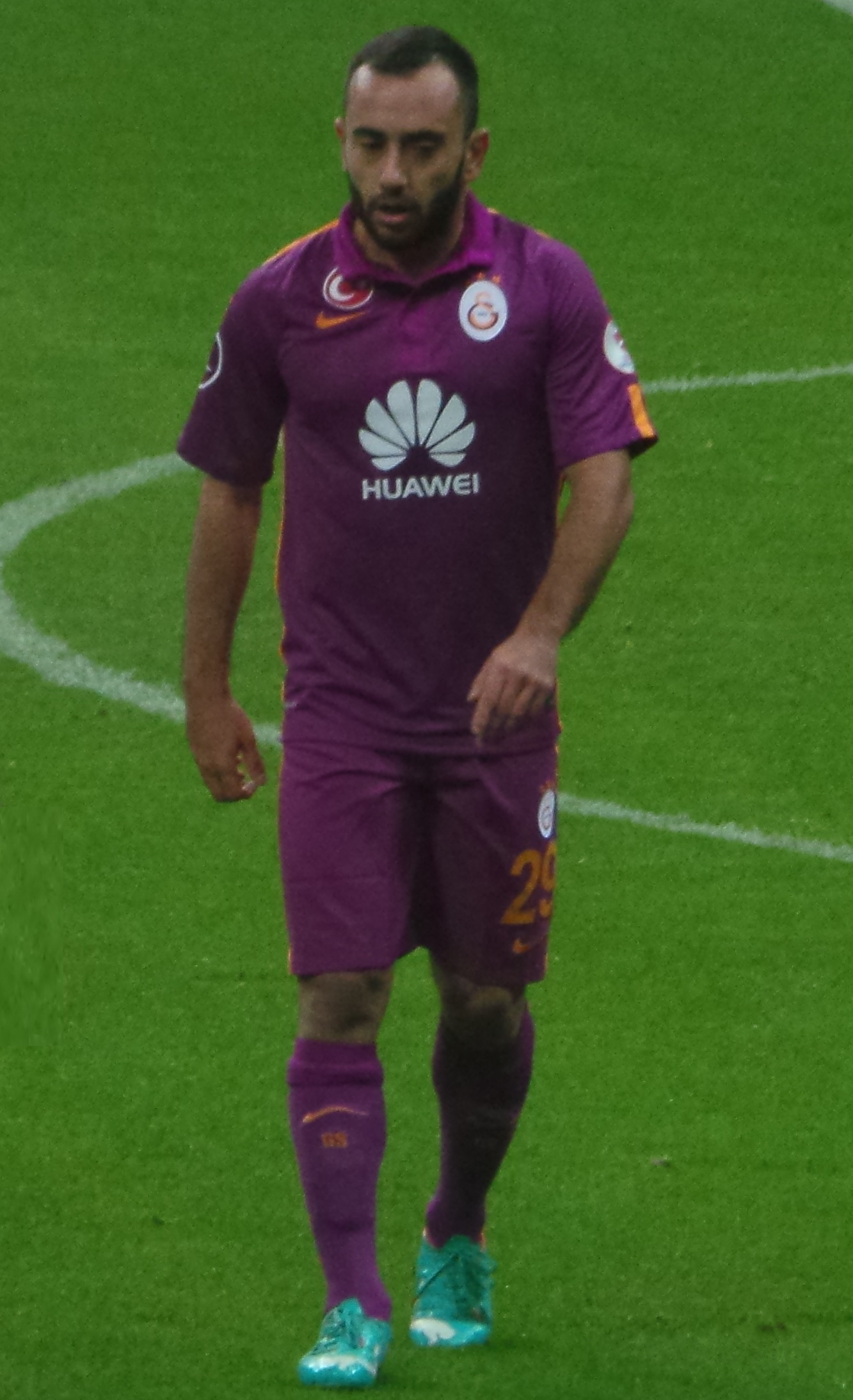 Olcan Adın, Galatasaray formasıyla Türkiye Kupası'ndaki Eskişehirspor maçında